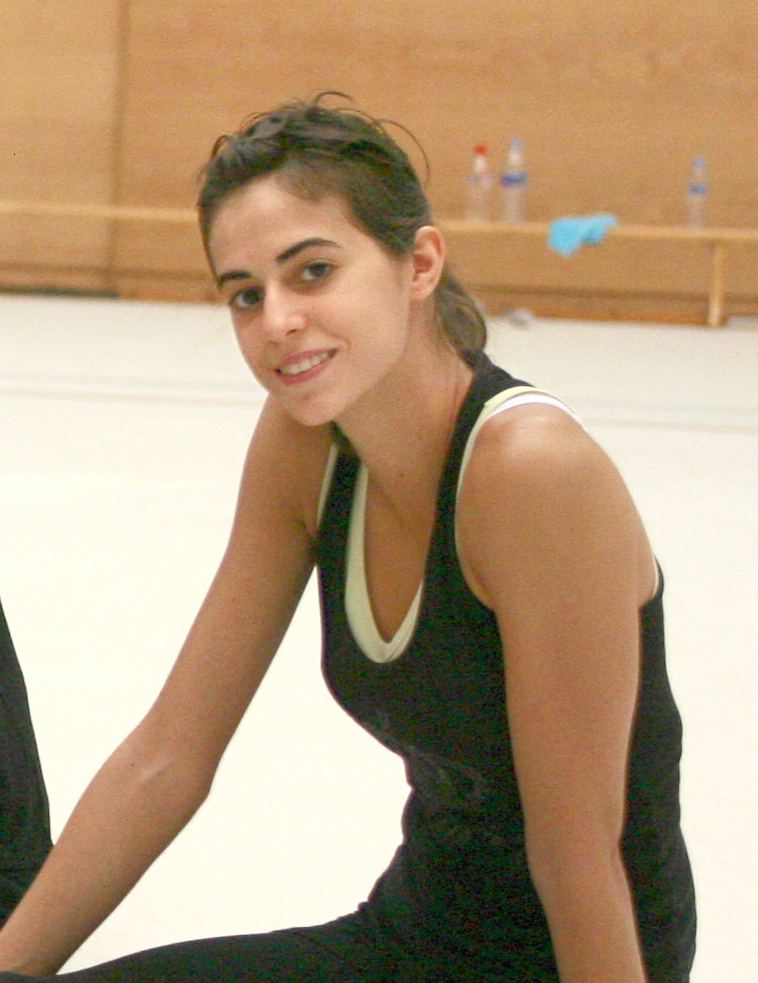 Lara González en el CAR de Madrid en el año 2007.